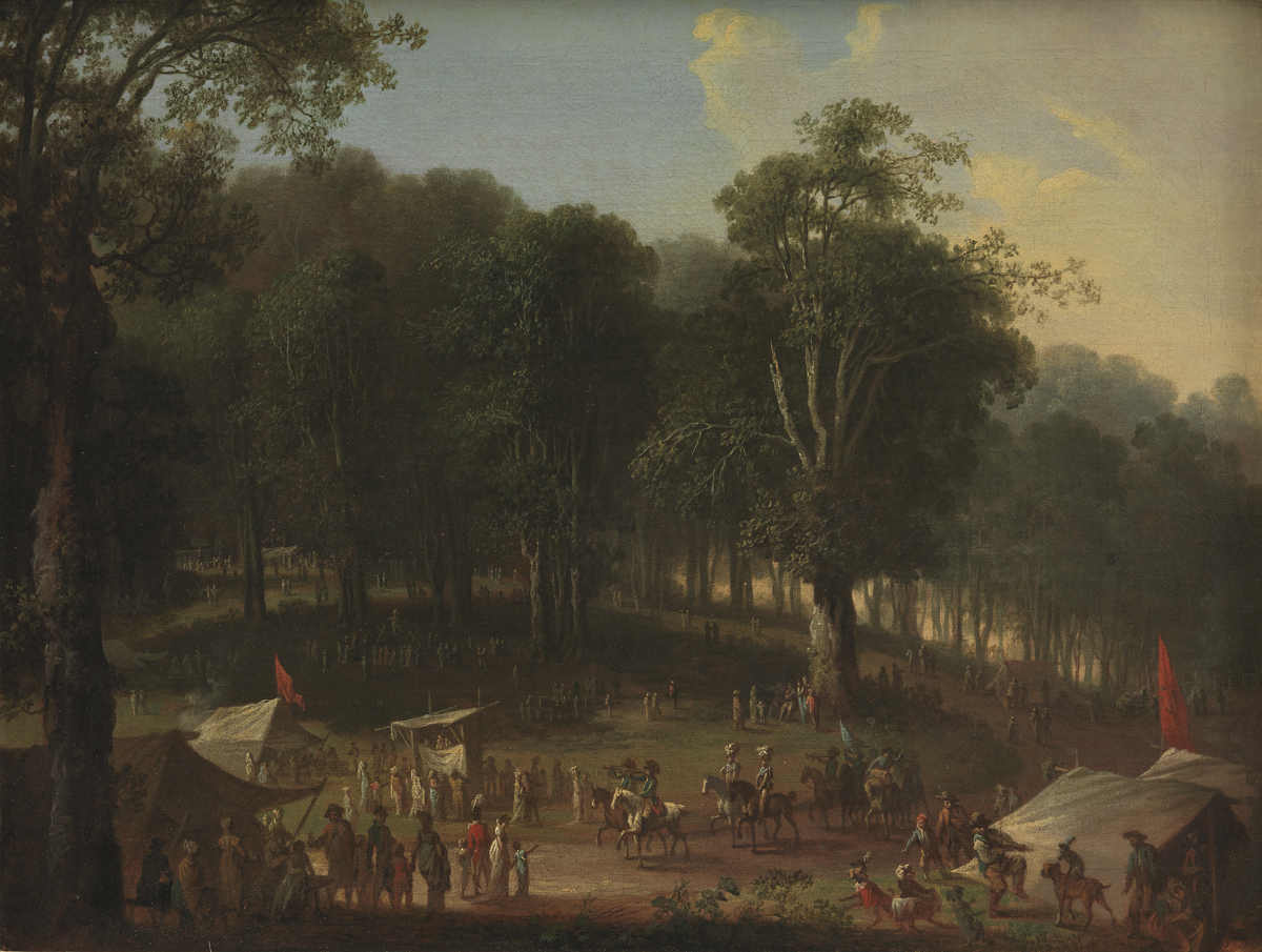 C.A. Lorentzen (1746-1828), En goeglertrup ankommer til Dyrehavsbakken, About 1800